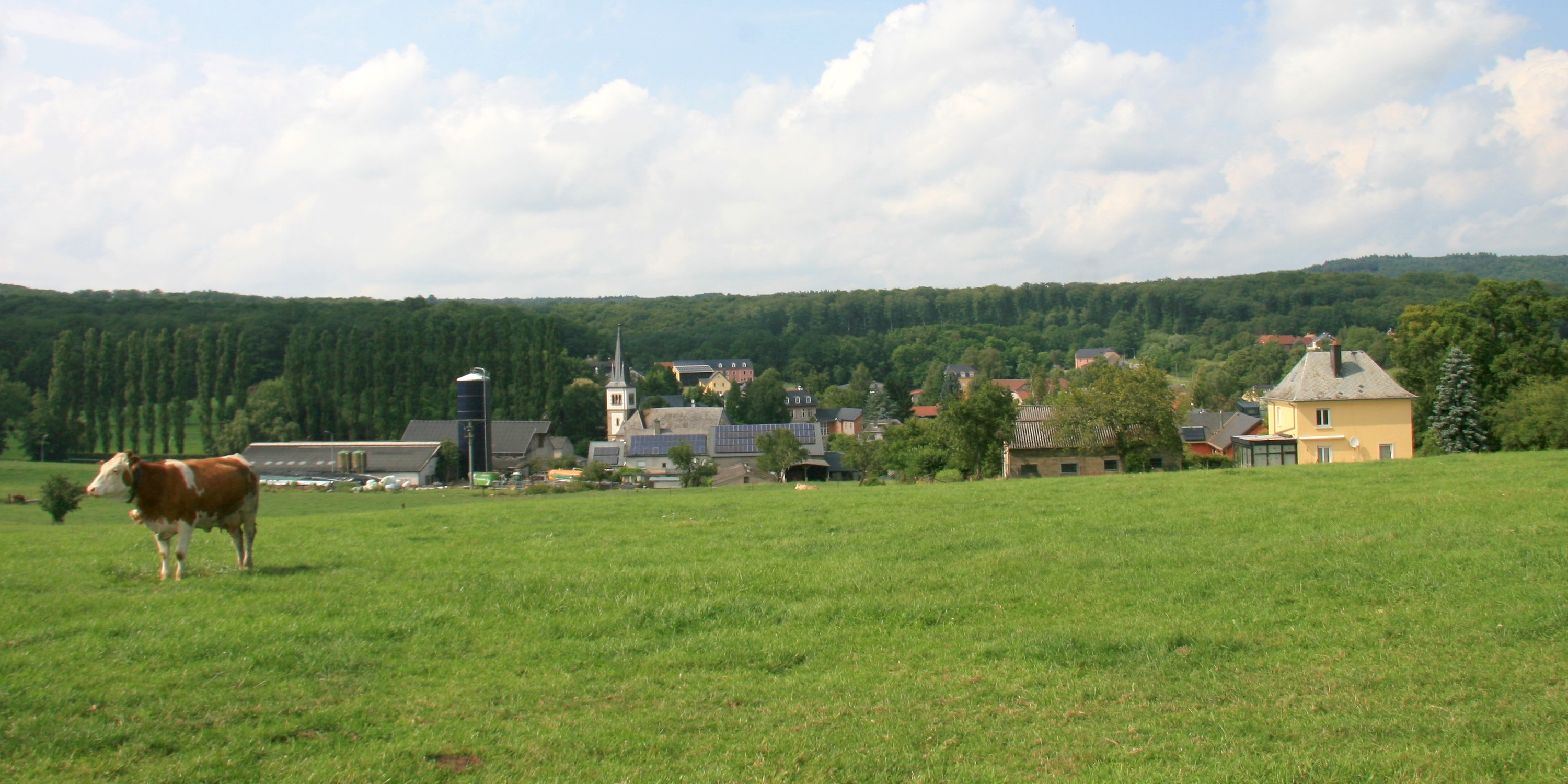 Vue op Beidler - user Ioni